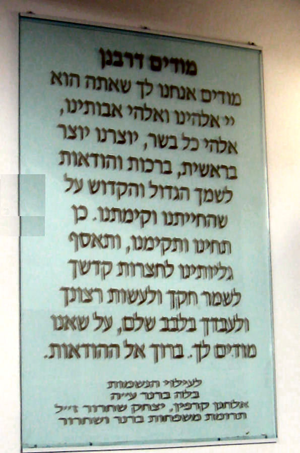 מודים דרבנן בבית הכנסת ביקיר רישיון נוצר על ידי משתמש:Daniel Ventura